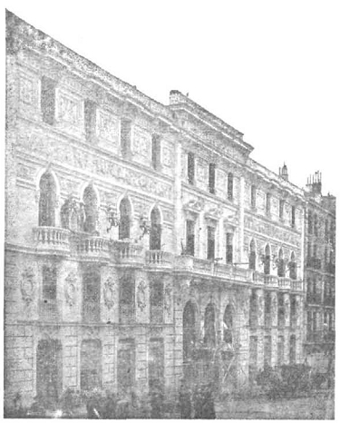 Grabado del Teatro Lírico de Madrid, publicado en la revista española Alrededor del Mundo.